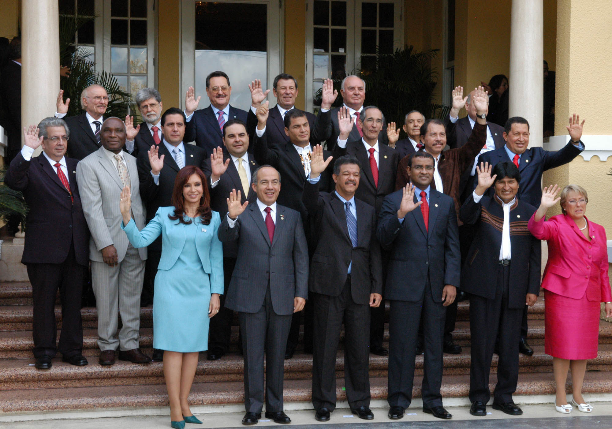 Presidentes de América Latina en la XX Cumbre del Grupo de Rio.